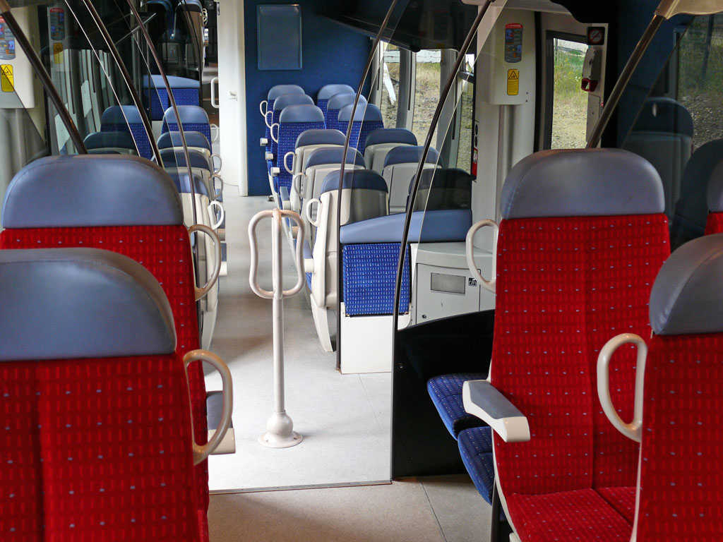 Intérieur de l'X 73813 de la SNCF, ancien 2101 des CFL.